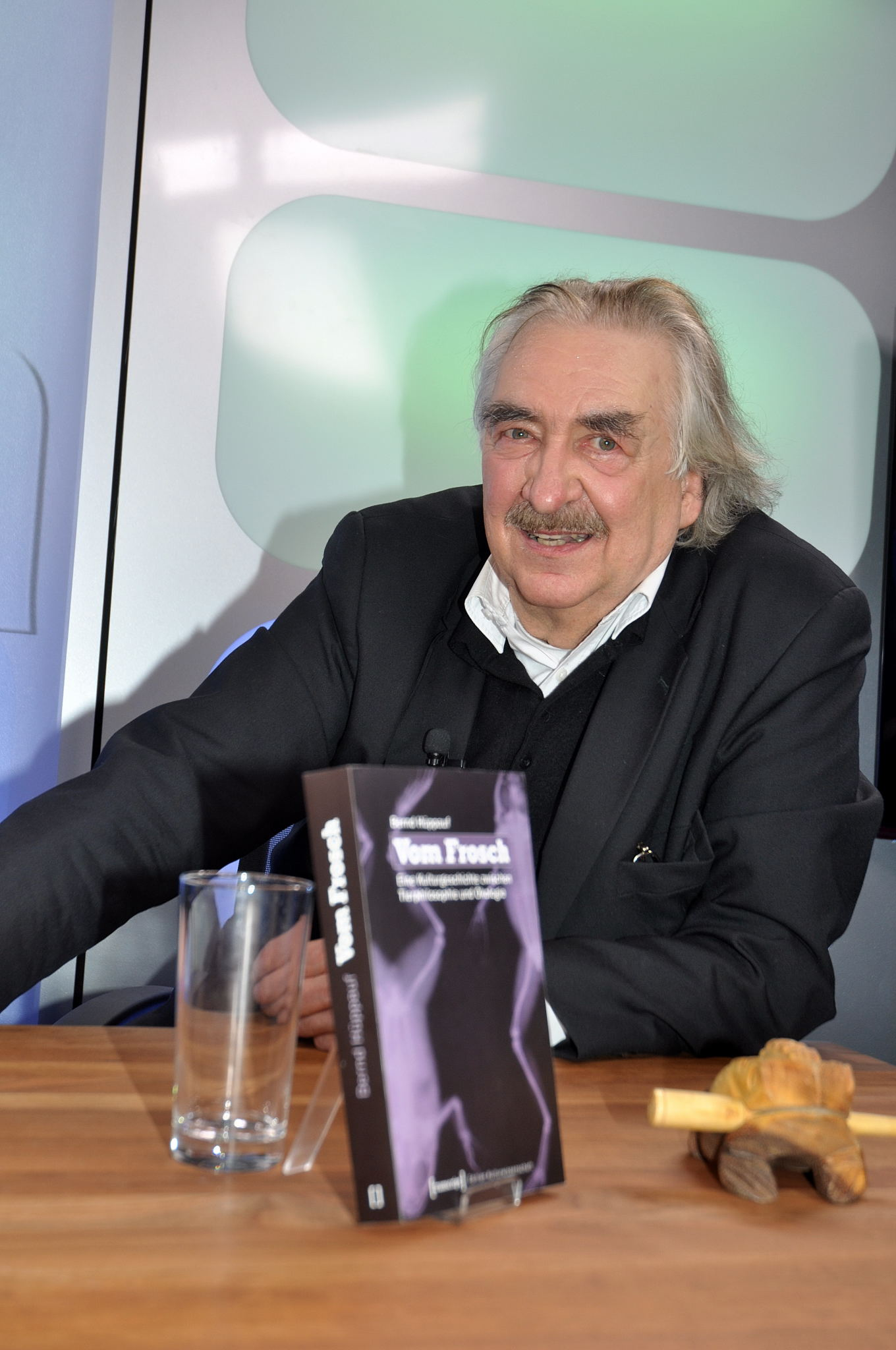 Fotografie von Hüppauf, Buchpräsentation